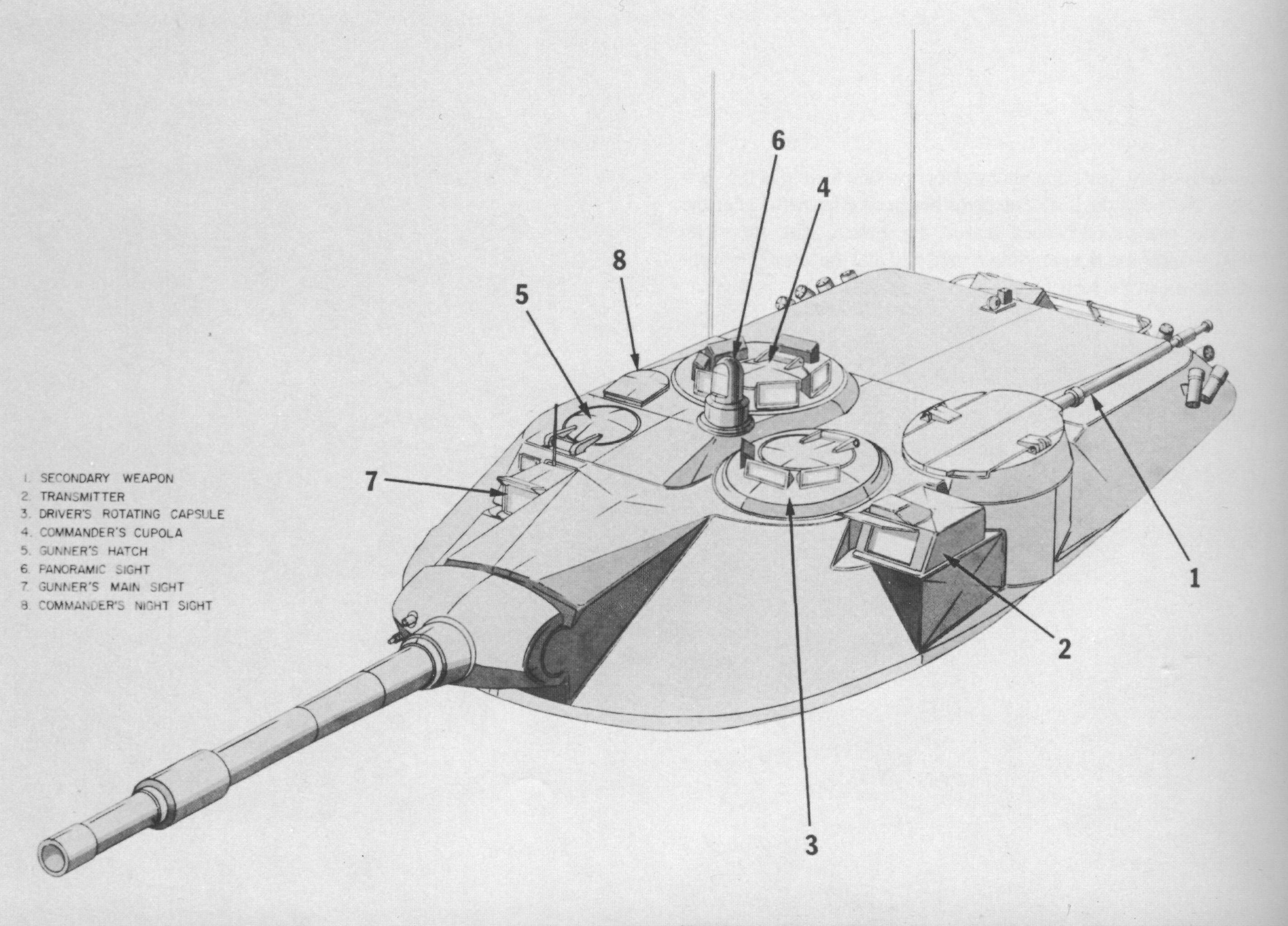 MBT-70 turret.